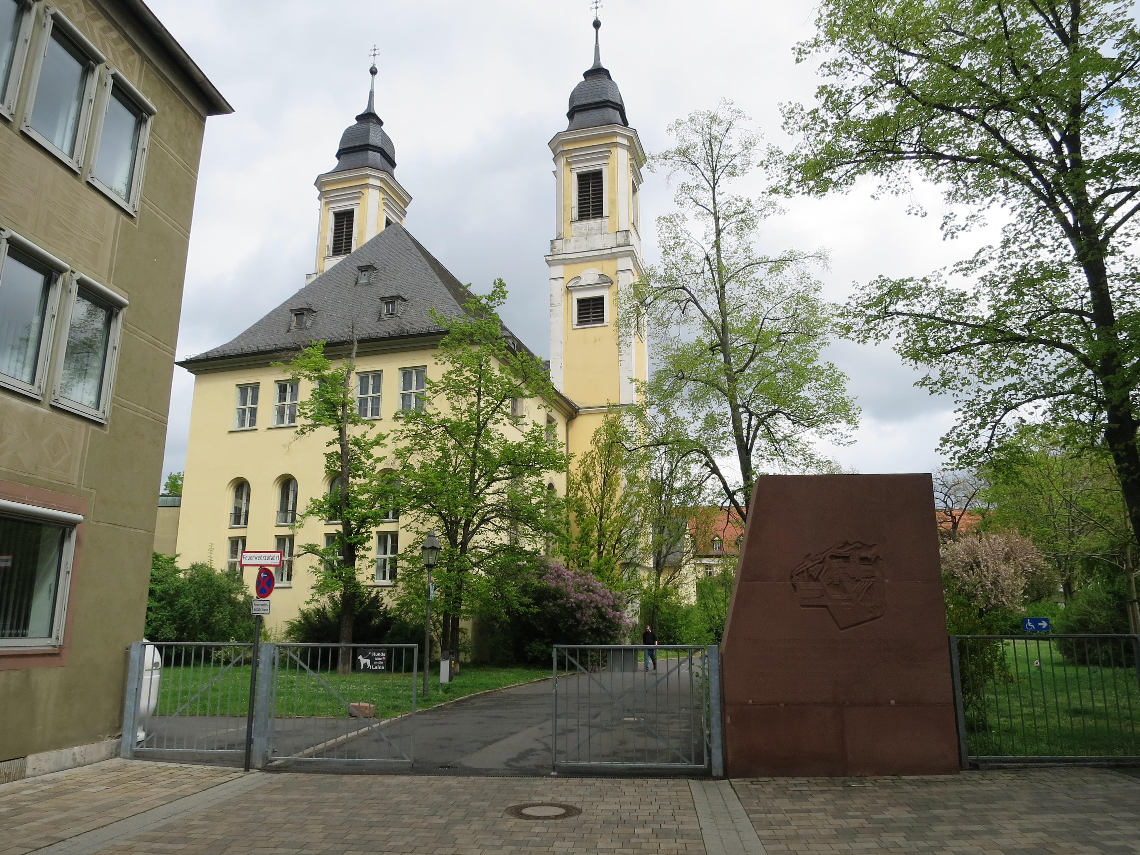 Evangelisch-Lutherische Pfarrkirche, ehemals Kirche des Kollegiatsstifts St. Peter und Paul, nachmals der Benediktinerabtei St. Stephan